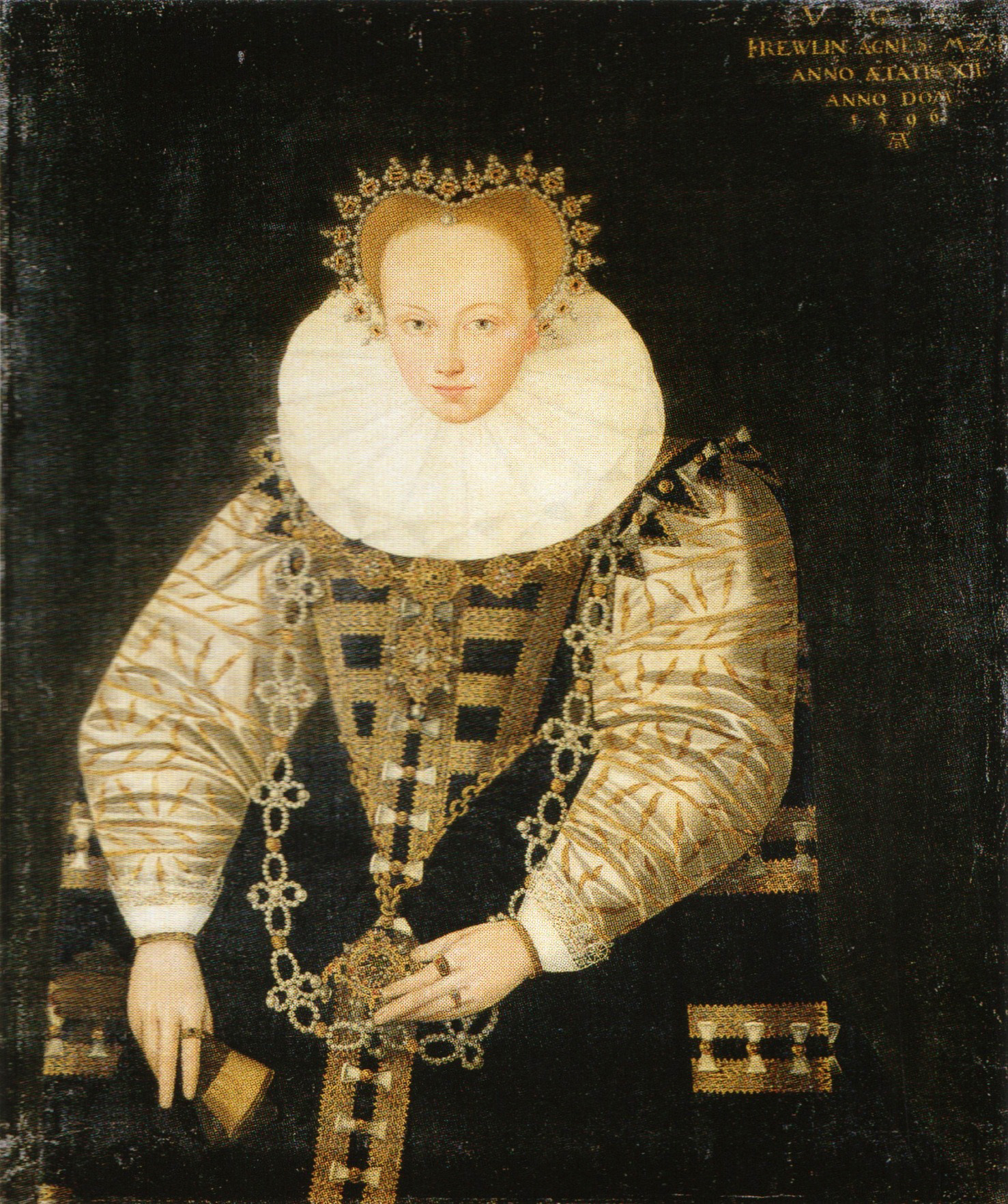 Ölgemälde von Agnes von Brandenburg, Tochter des Kurfürsten Johann Georg und als Gemahlin von Philipp Julius Herzogin von Pommern-Wolgast.